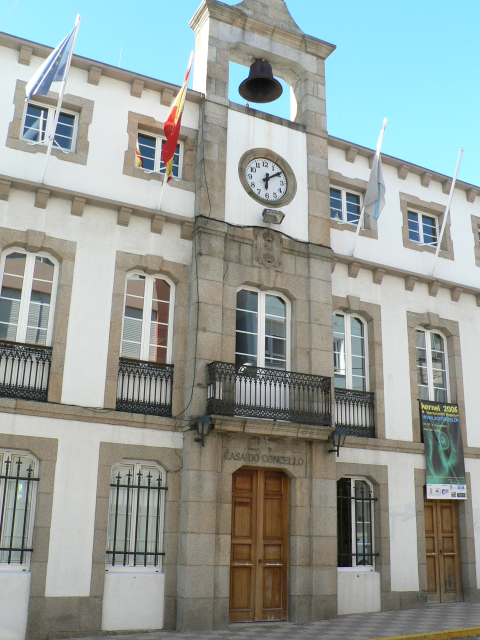 Vila de Mugardos Licensing Mugardos Categoría:Imaxes de Mugardos